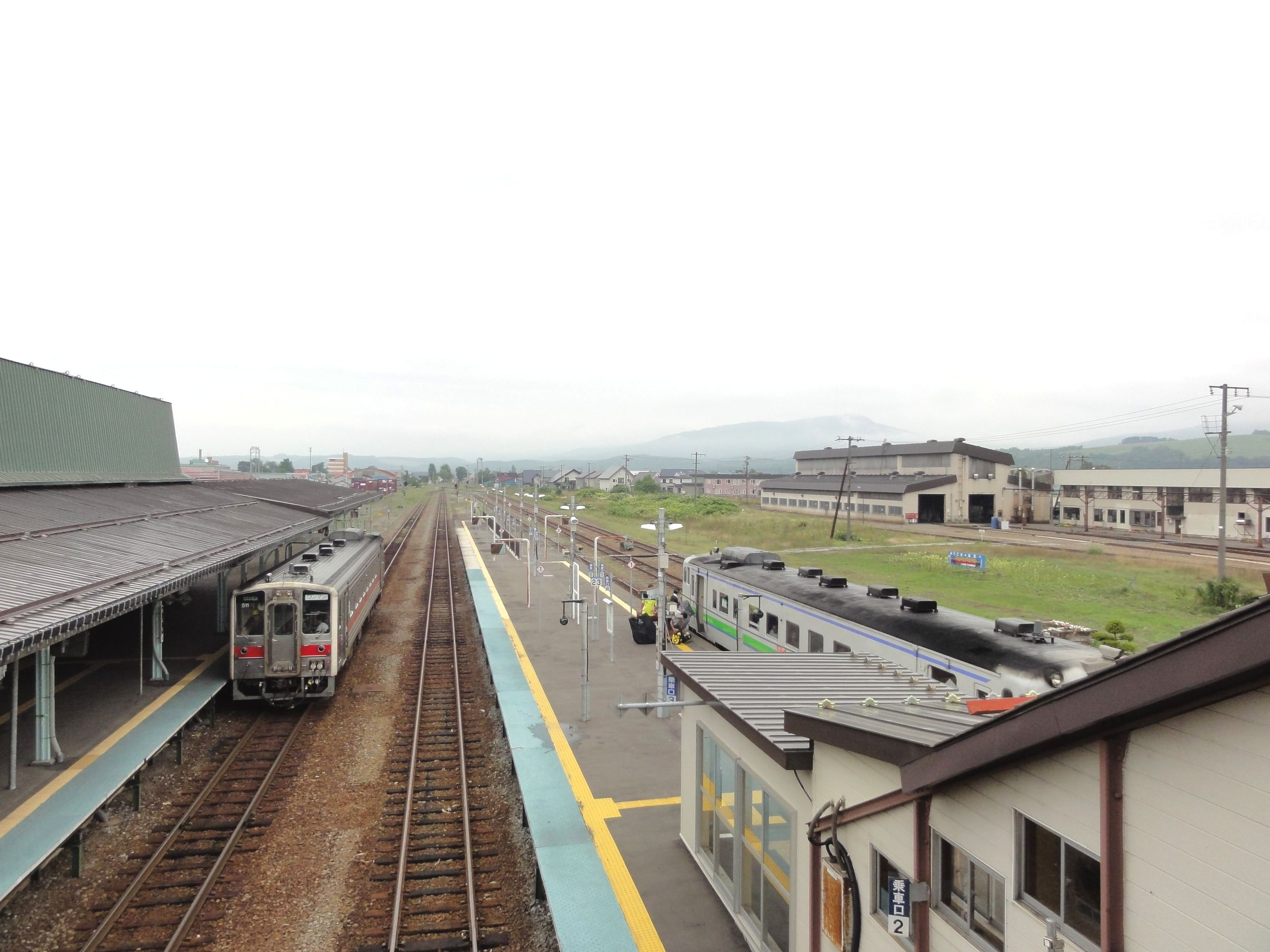 名寄駅ホーム